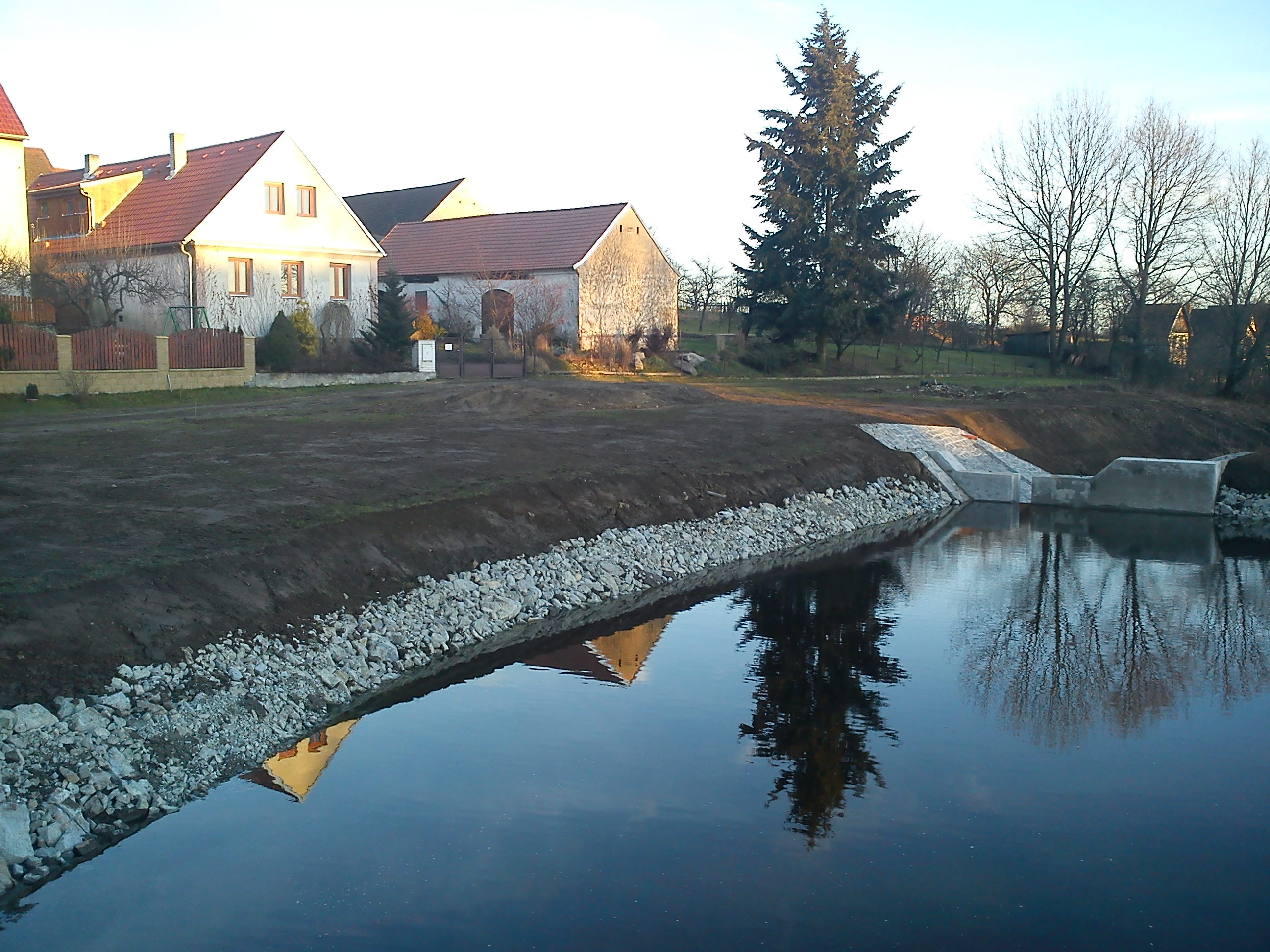 autor fotografie Jiří Švec